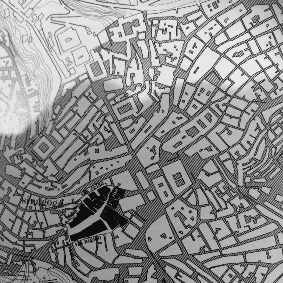 Mappa della Giudecca della Città di Caltagirone